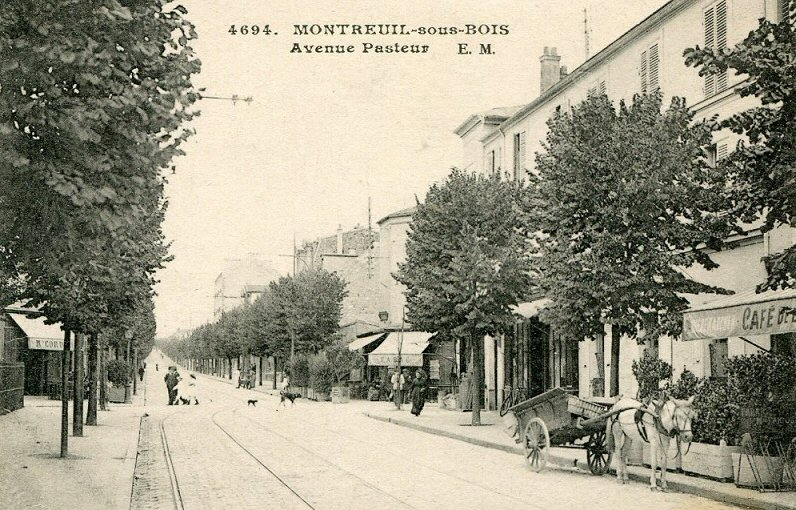 L'avenue Pasteur à Montreuil-sous-Bois